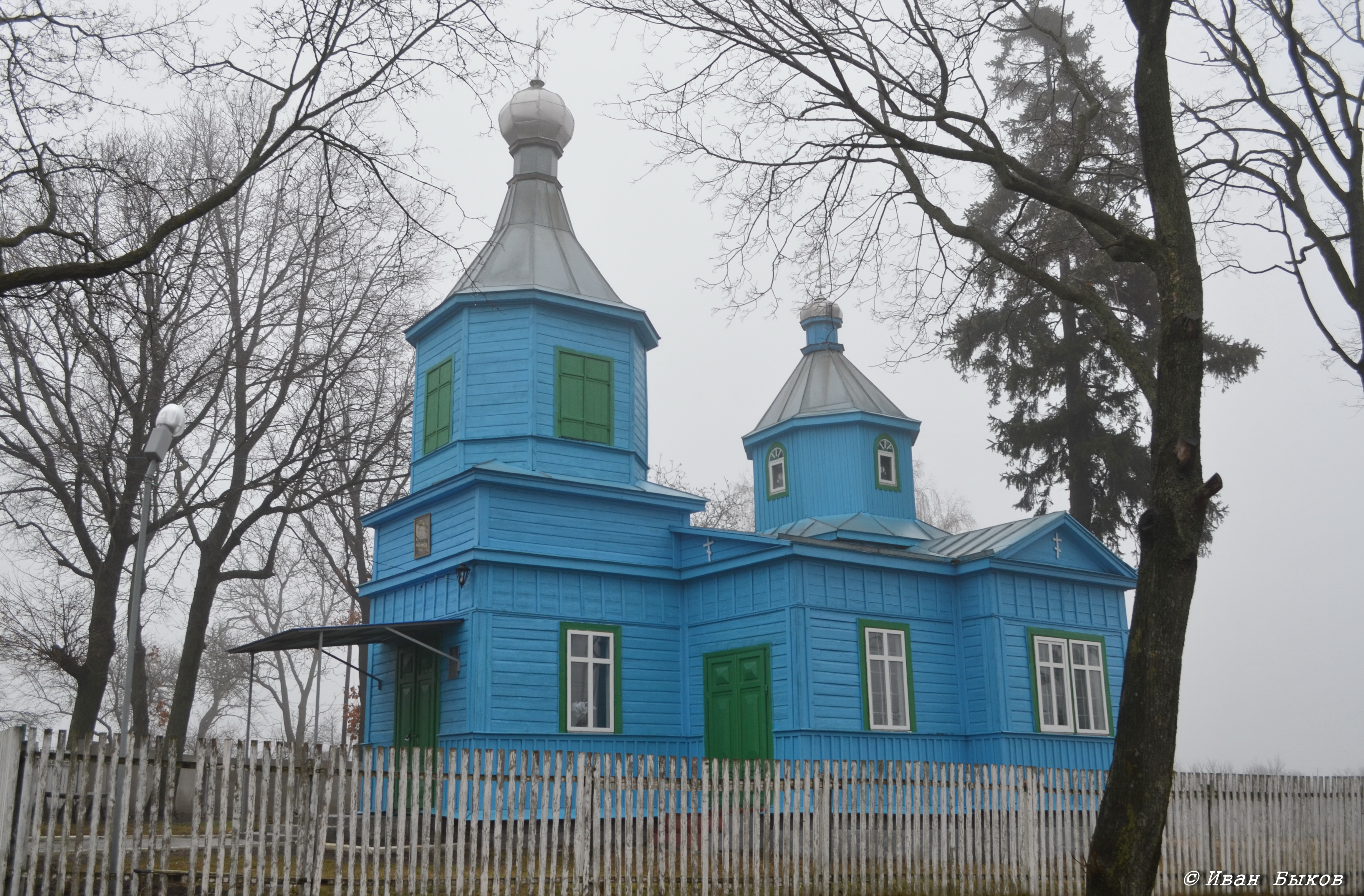 Дубівка. Церква Олександра Невського. Реальна дата побудови - 1861 р.